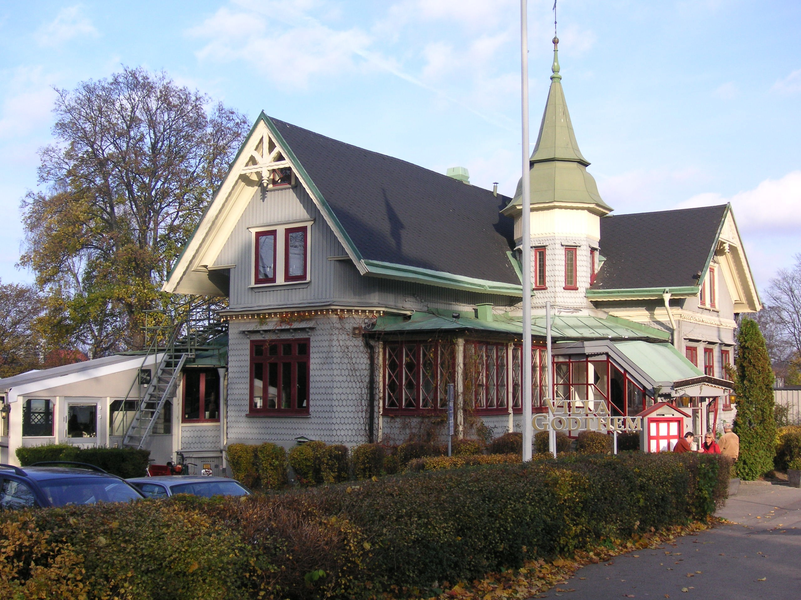 "Villa Godthem" på Södra Djurgården i Stockholm